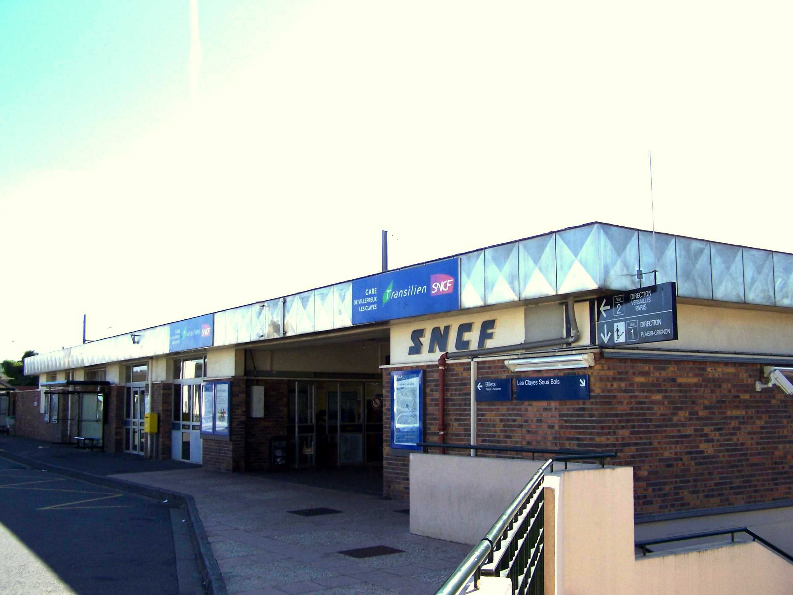 Les Clayes-sous-Bois (Yvelines, France) : gare de Villepreux-Les Clayes